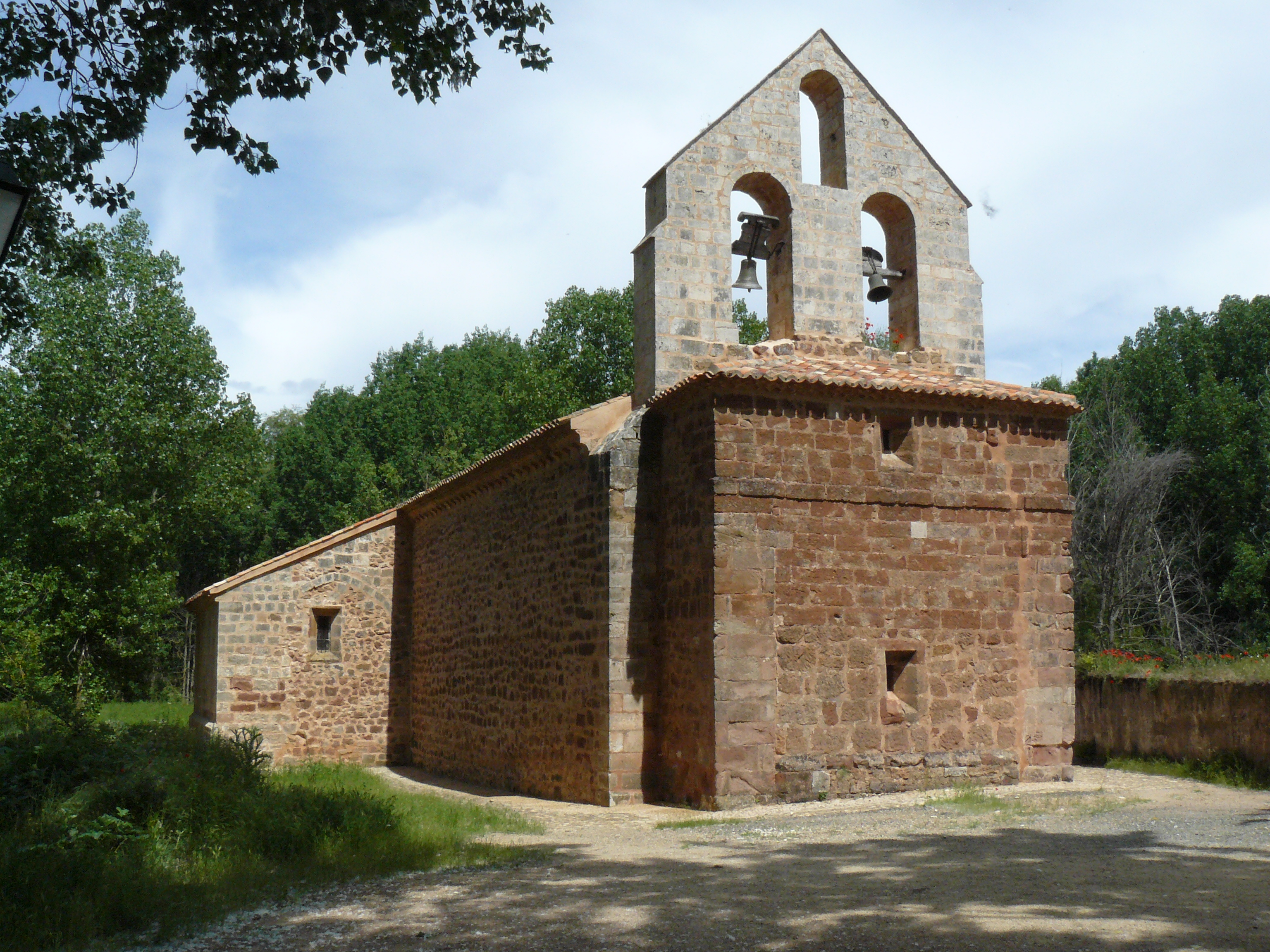 Iglesia de Santa Coloma, Albendiego, Guadalajara.